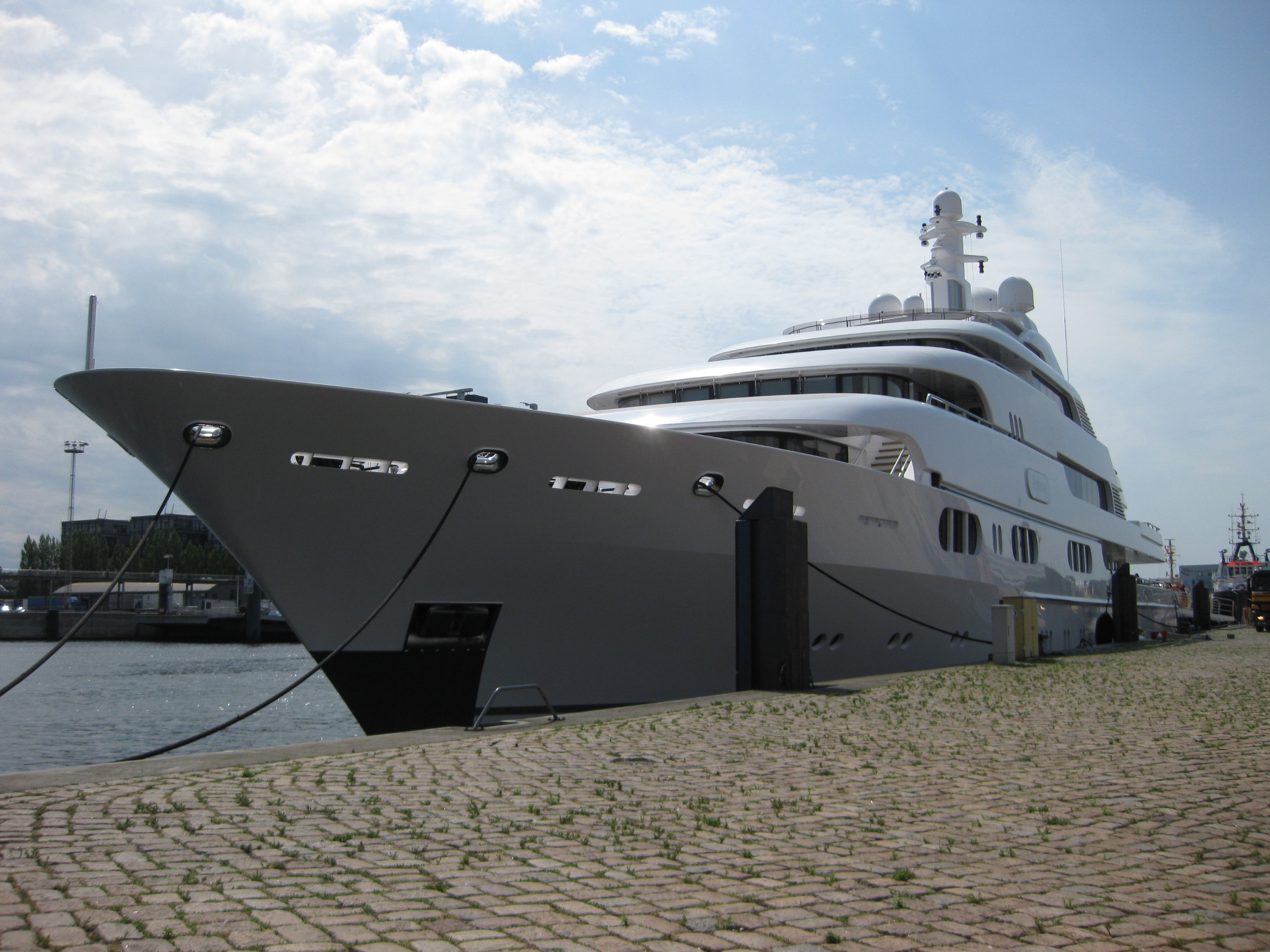 Apoise (jetzt Titania) Seitenansicht